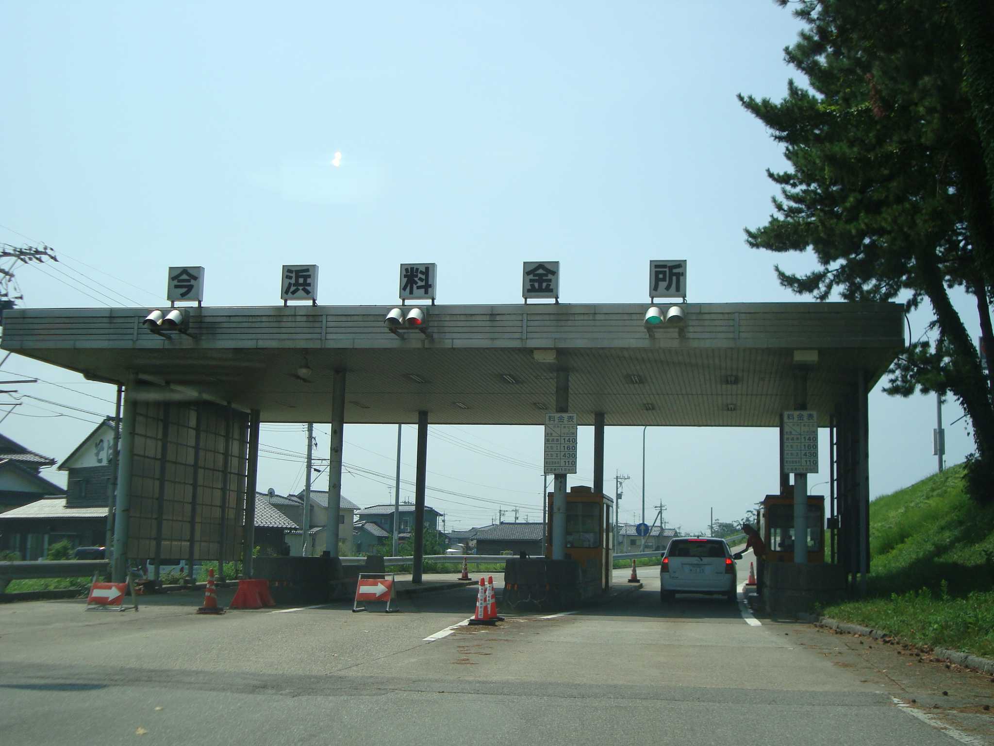 能登有料道路 今浜インターチェンジ 金沢方面料金所